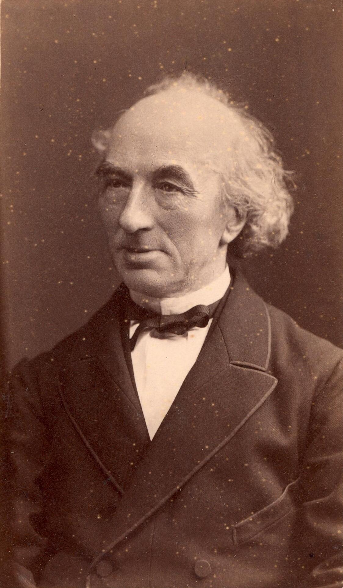 Portret van Jan Ensing (1819-1894)